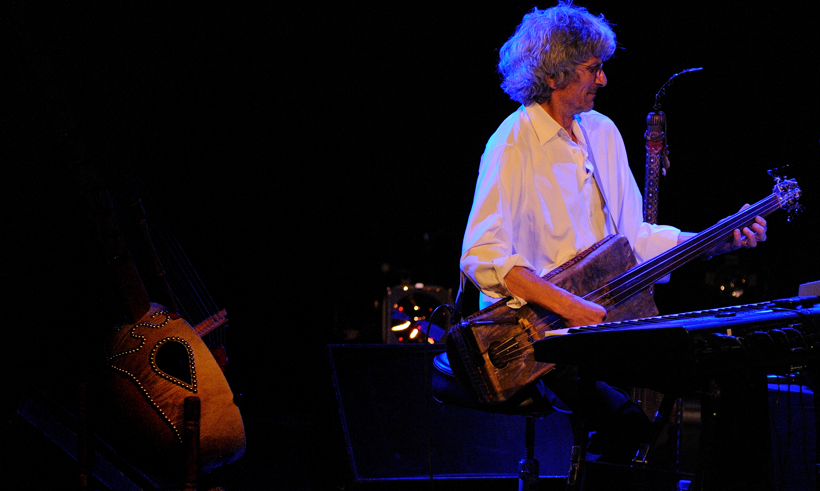 photo 2 loy